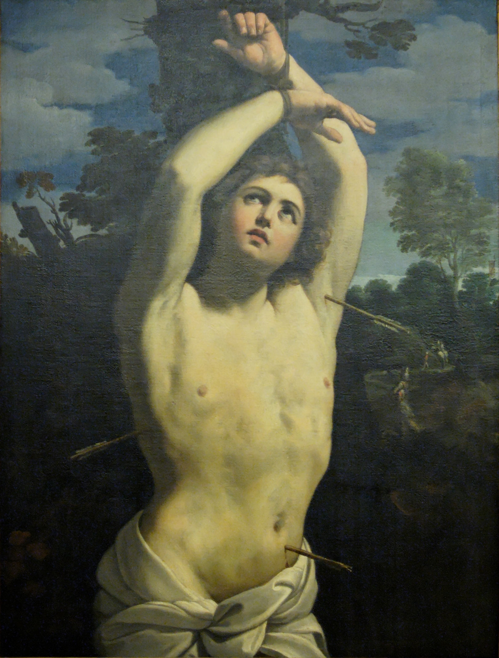 Saint Sebastian